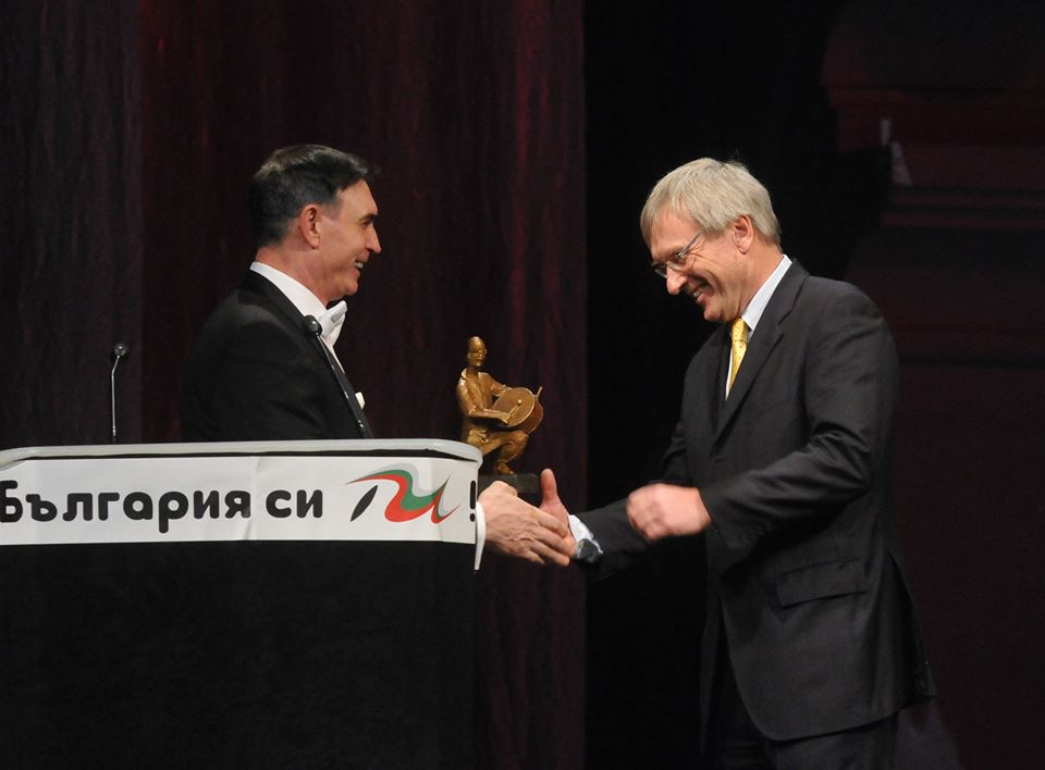 Димитър Куцаров и посланика на Германия Матиас Хьопфнер на Годишни награди България си ти